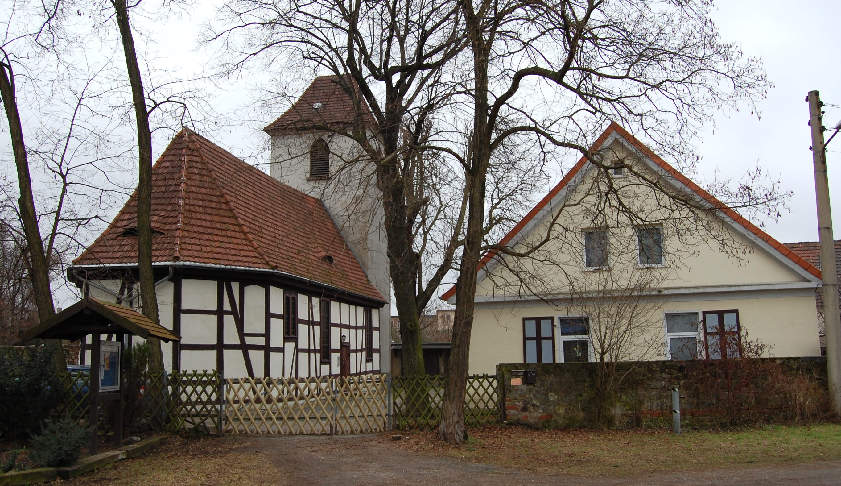 Blick auf die Martin-Gallus-Kirche in Fermersleben